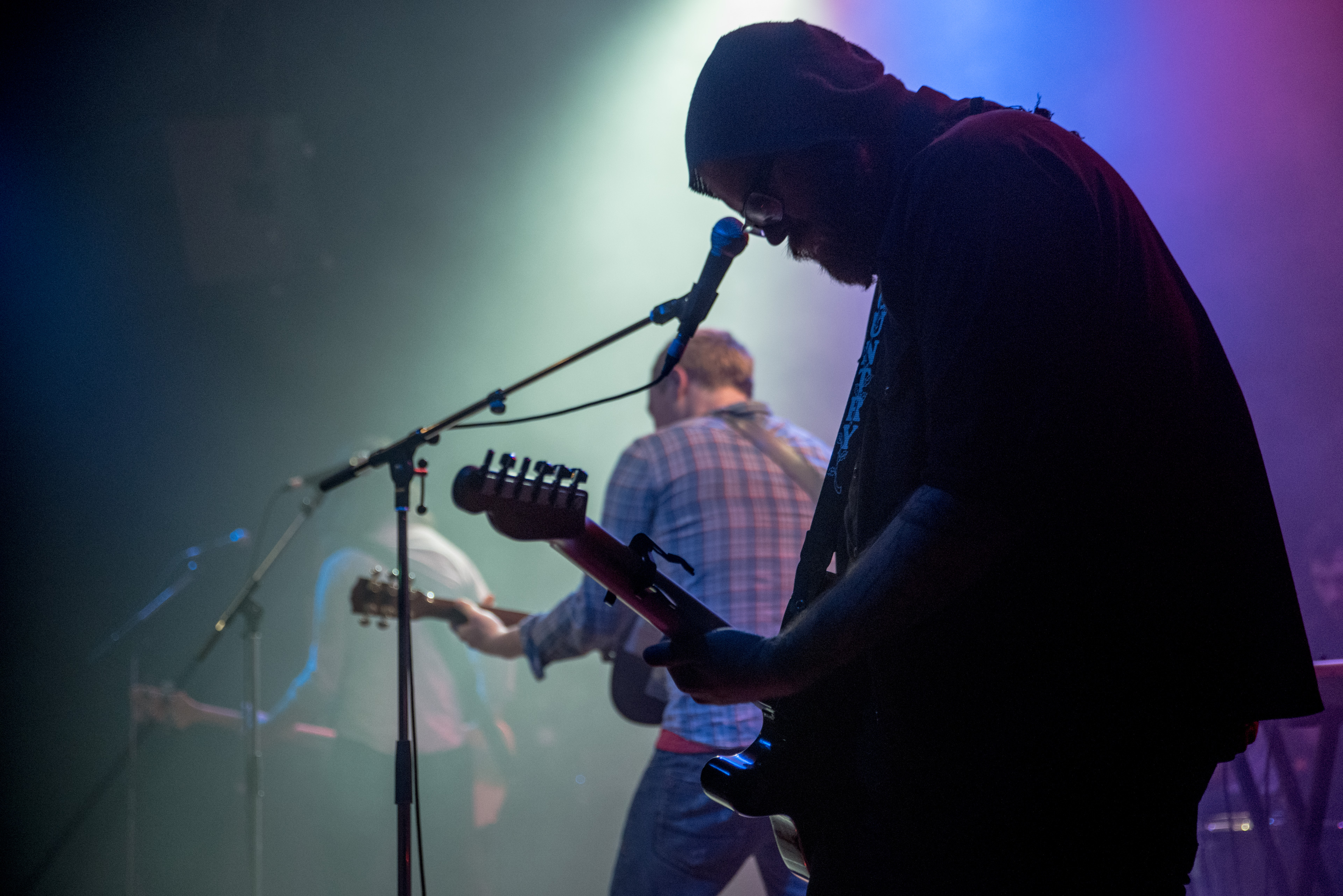 de The Builders and Butchers 2014 Muenchen Kranhalle